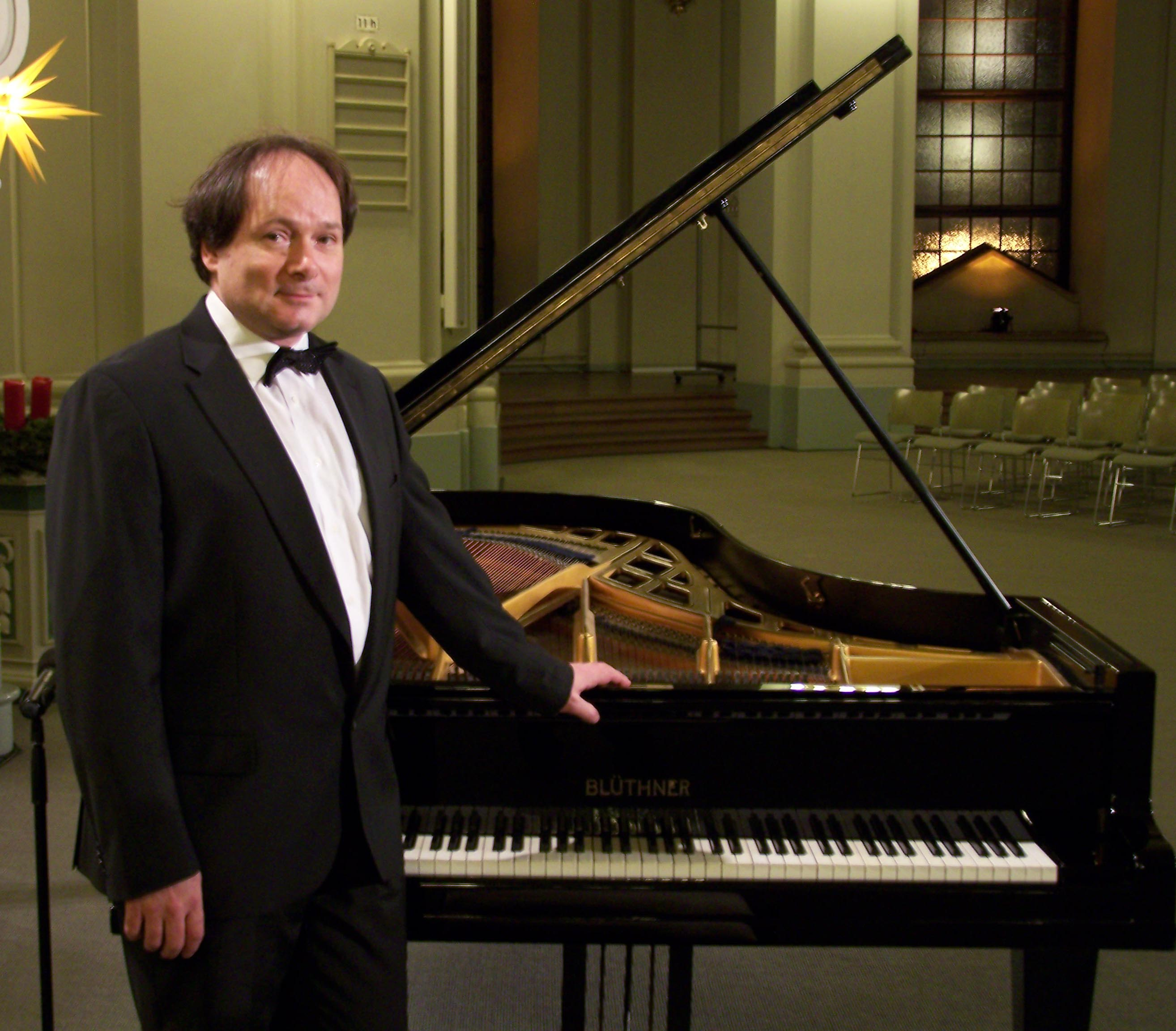 Andreas Wolter vor dem Fr. Dom Konzert